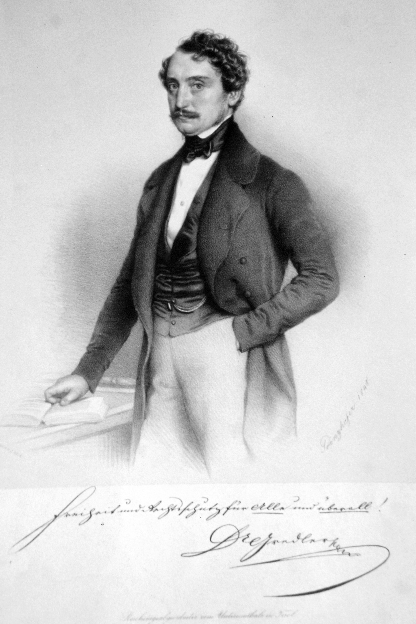 Dr. Andreas Freiherr von Grredeler (1801-1870), Jurist, Abgeordneter Lithographie von August Prinzhofer, 1848